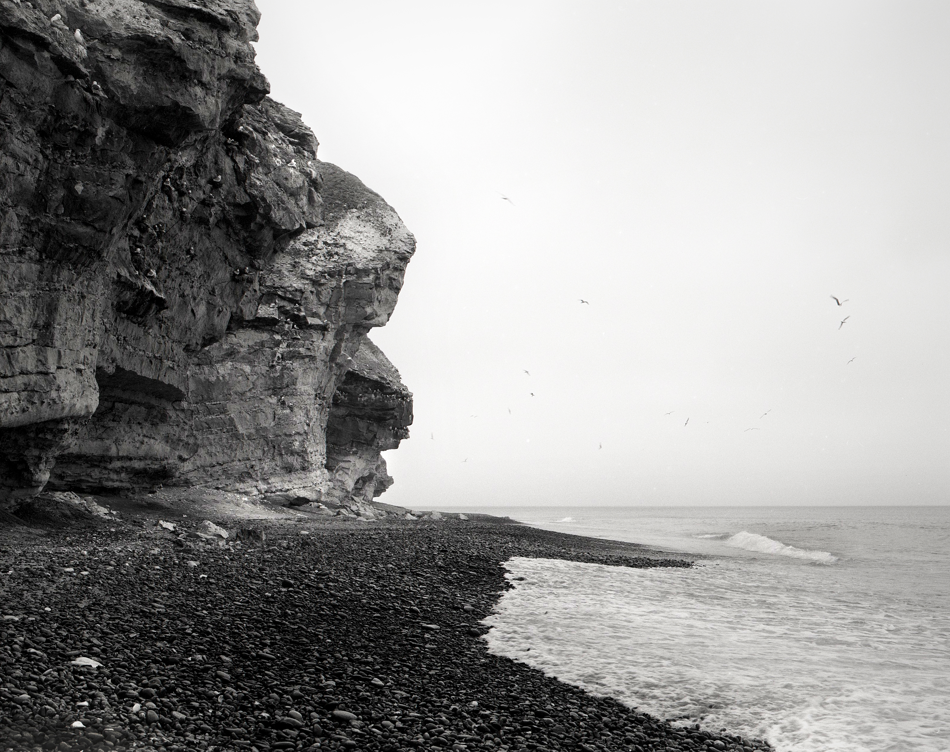 Bullberg Dänemark